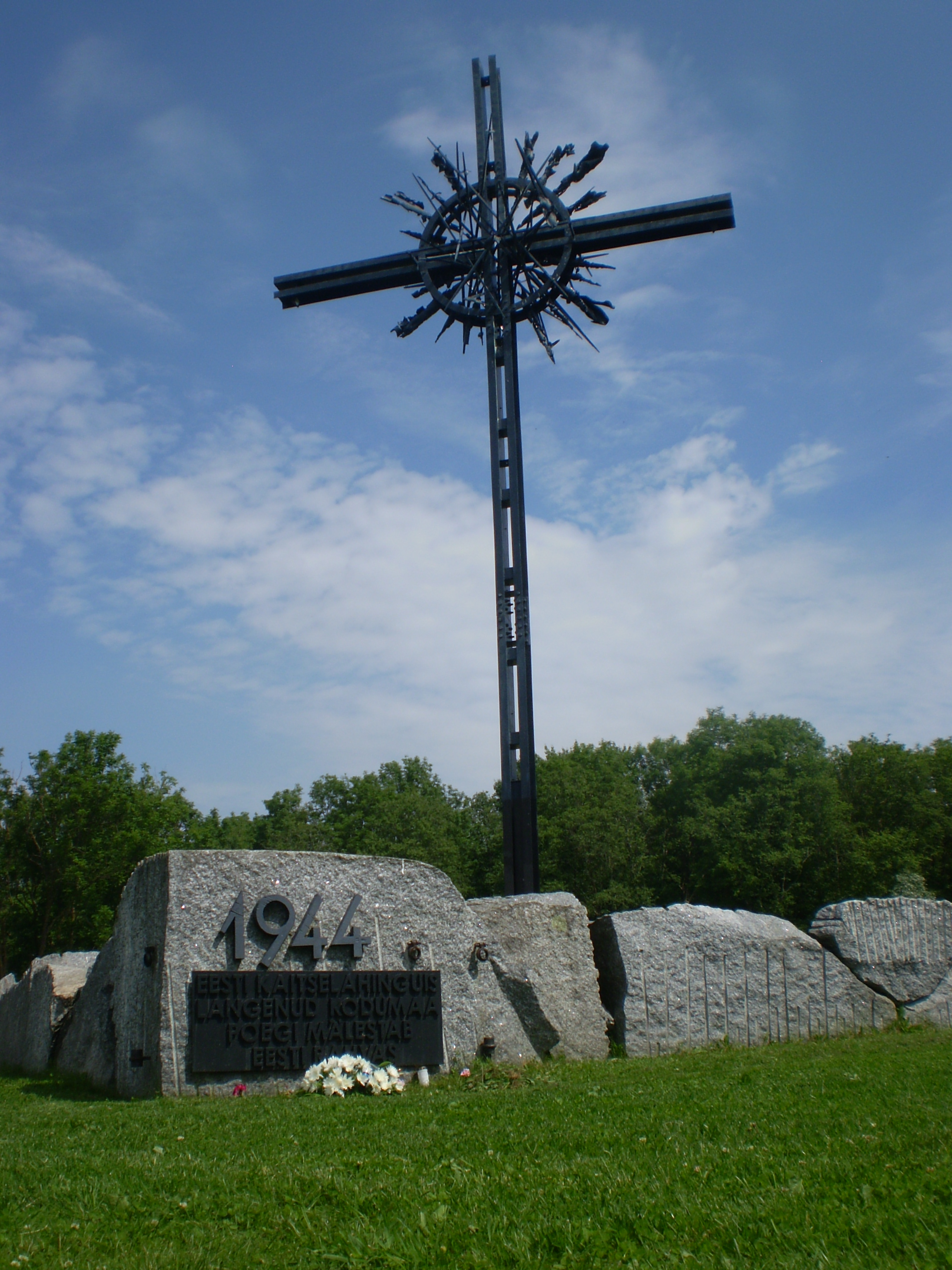 II maailmasõja Sinimägede lahingu koht